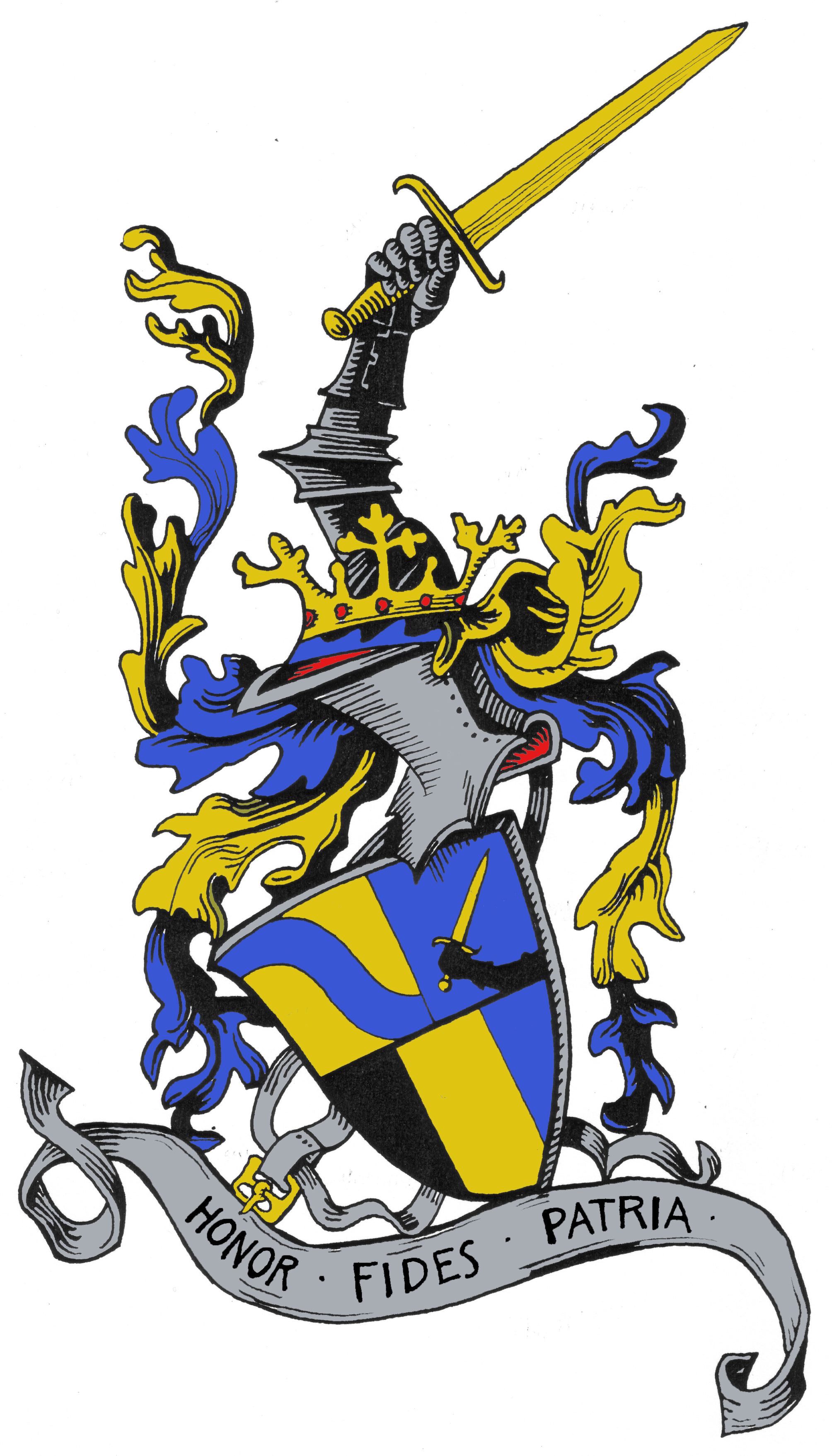 Studentenwappen des (legitimistischen) Corps Danubia Graz